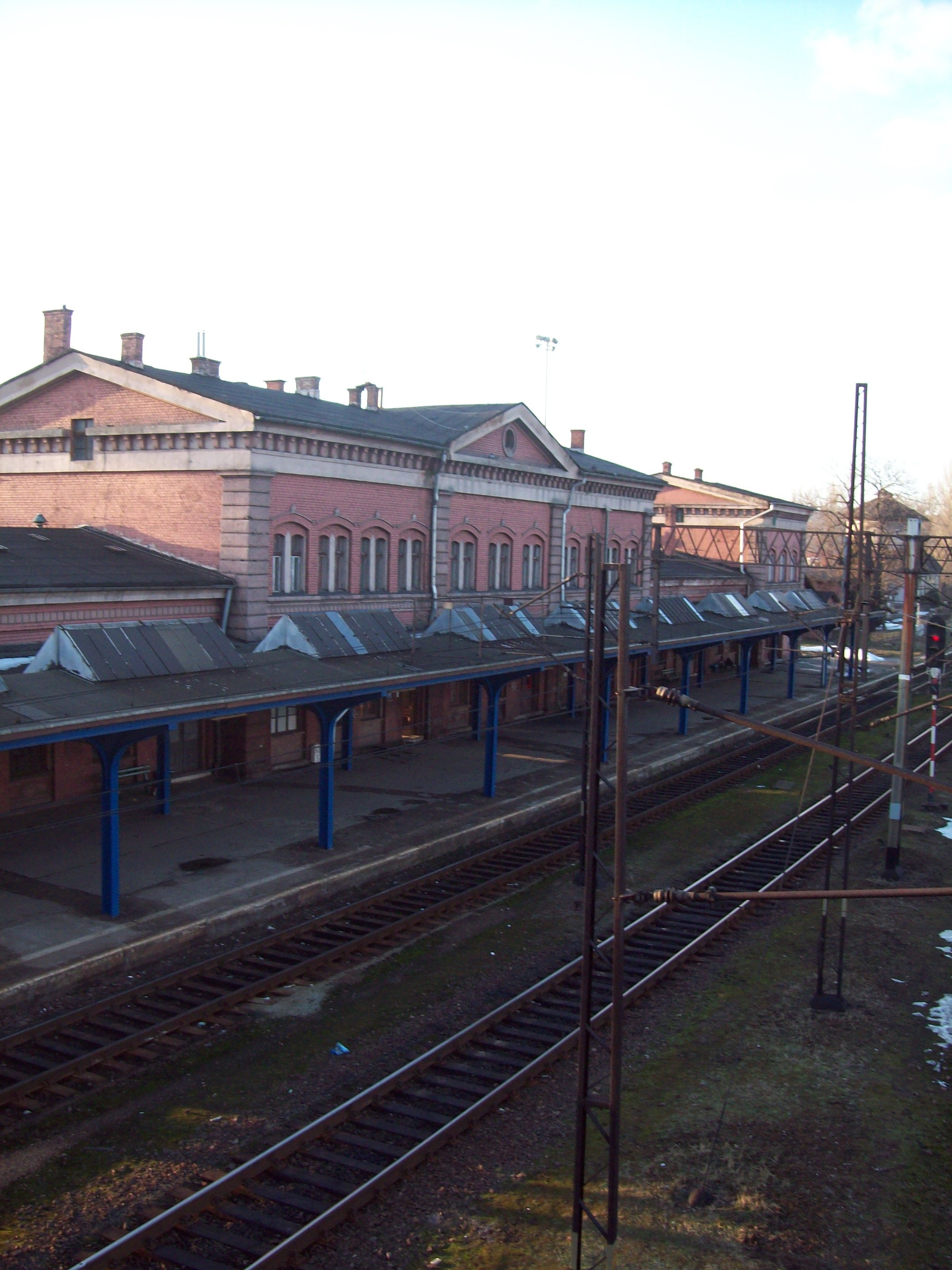 Kłodzko Główne, widok na peron 1 z kładki nad torami